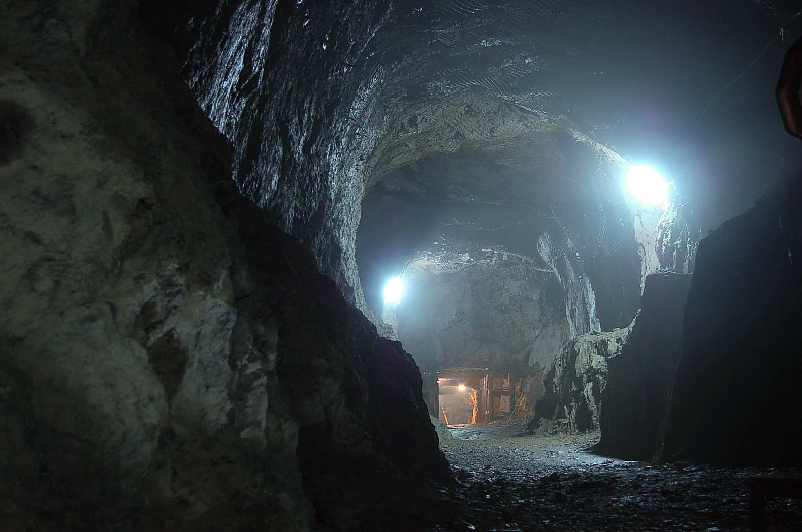 Miasto podziemne w Osówce